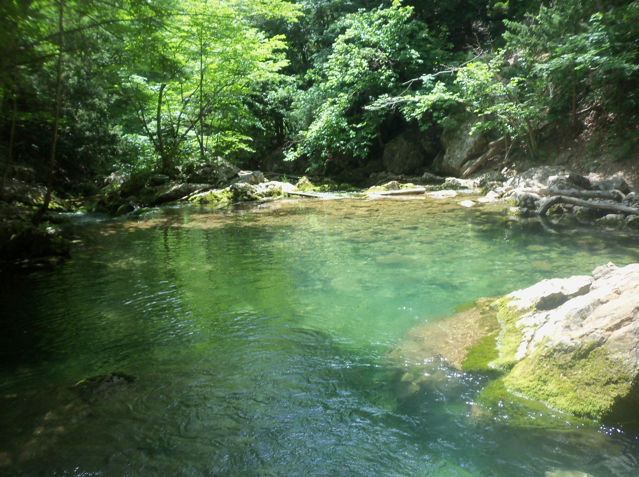 Голубе озеро у Великому каньйоні